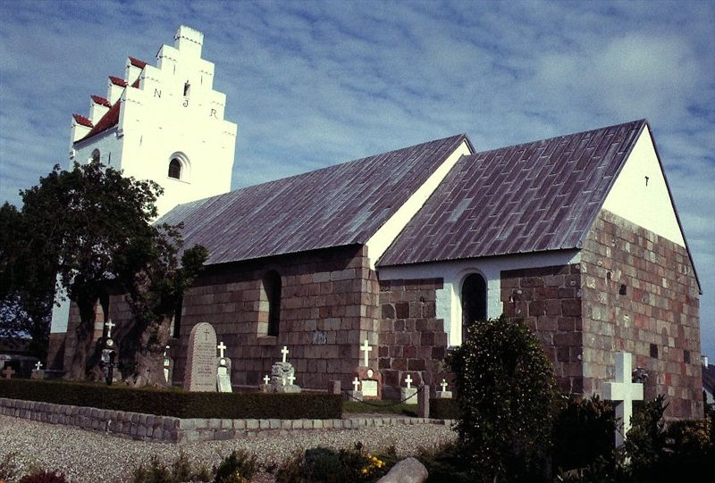 Bislev Kirke, Aalborg Kommune, set fra sydøst